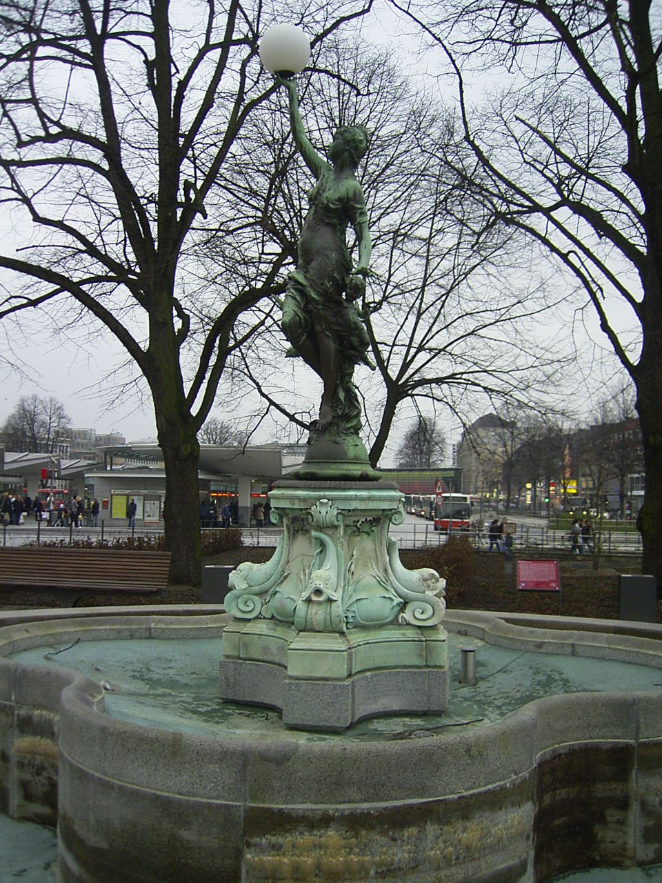 Der Puvogel-Brunnen am Markt in Wandsbek ist dem ehemaligen Bürgermeister Friedrich Puvogel gewidmet und wurde von Cuno von Uechtritz-Steinkirch gestaltet.